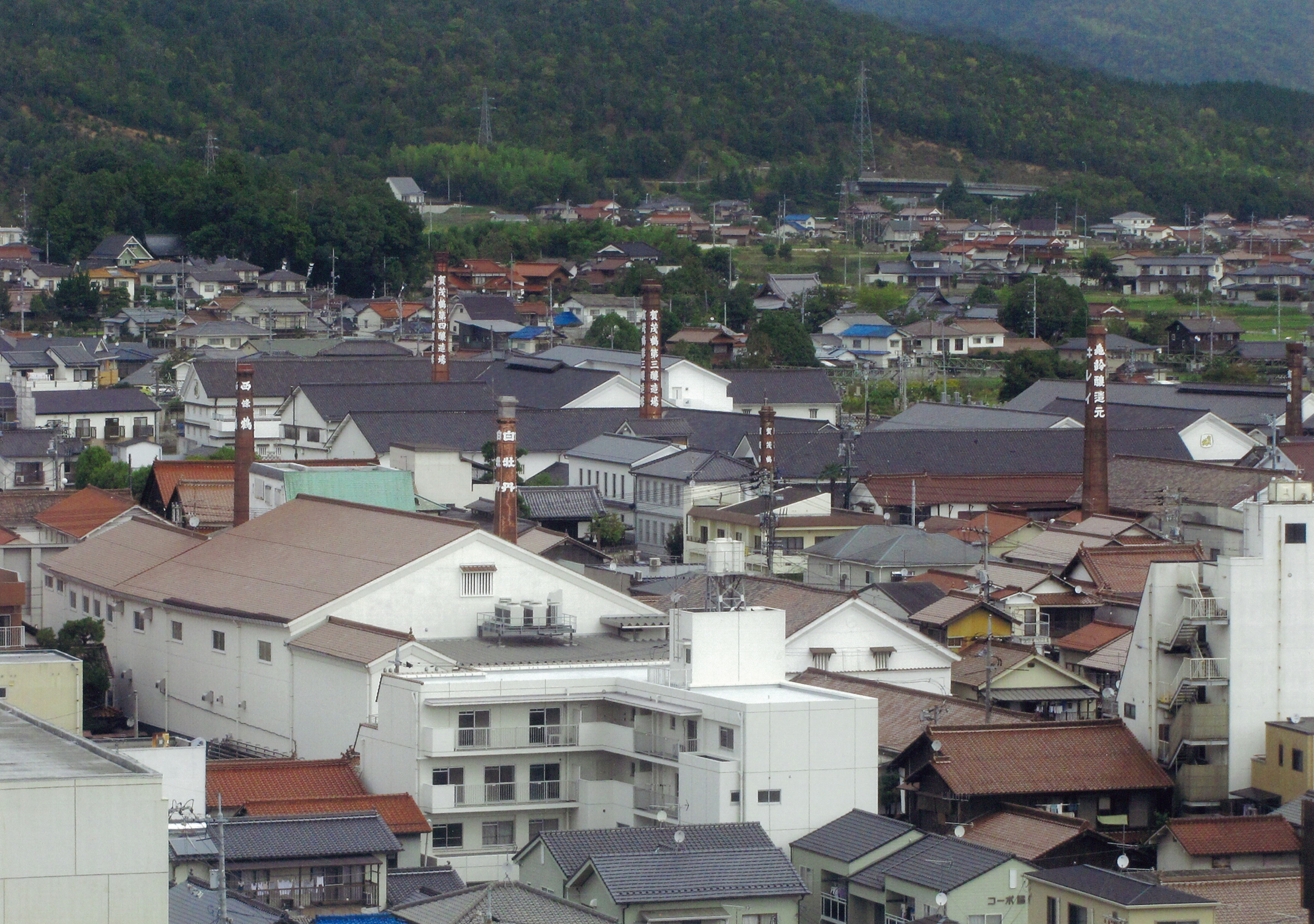 酒蔵通り（西条町、2013年10月）